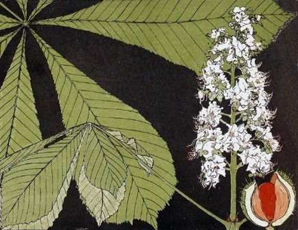 Aesculus hippocastanum - Horse chestnut